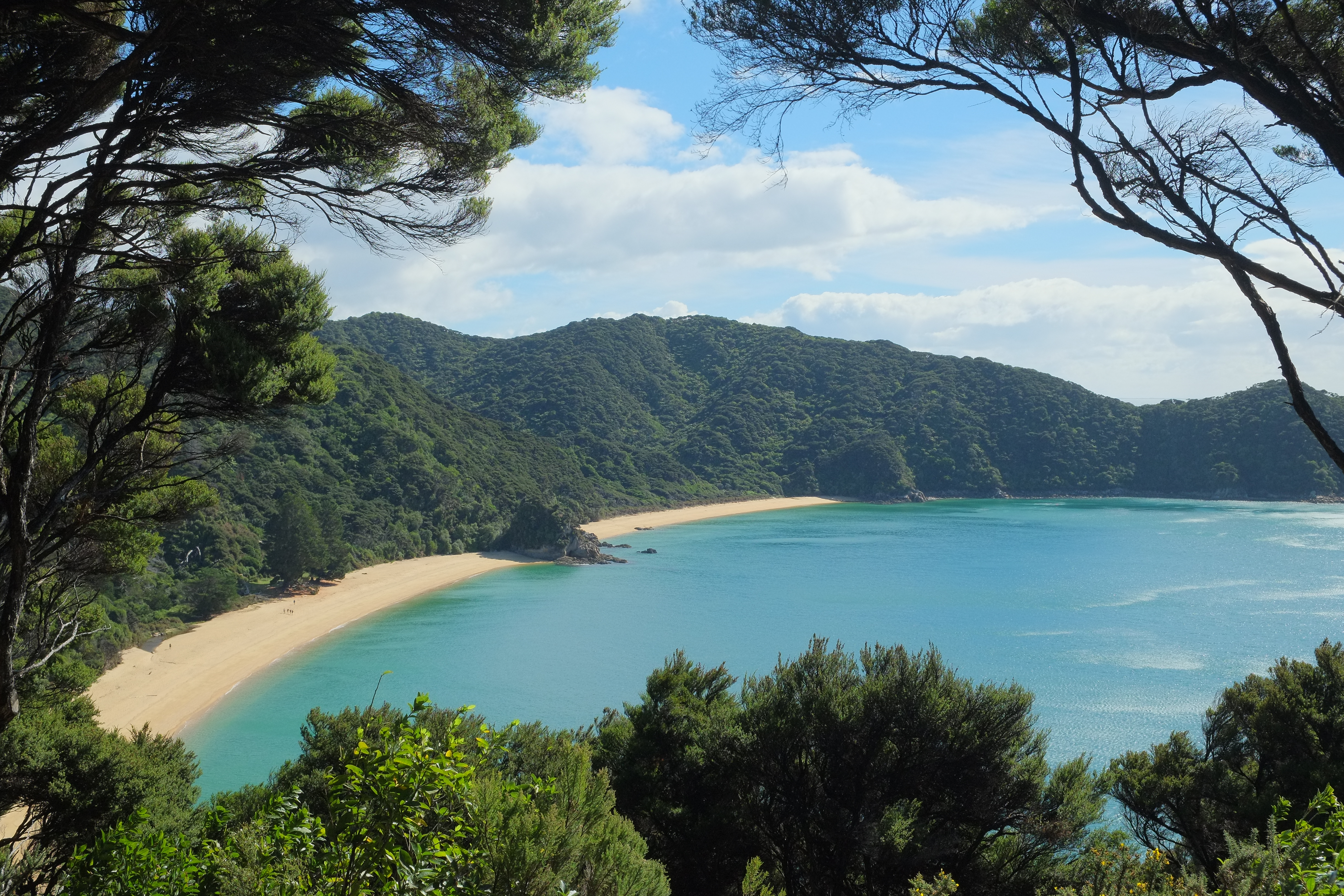 Anatakapau Bay and Mutton Cove